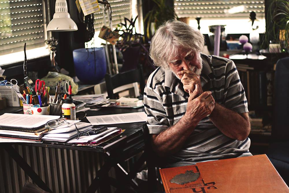 Dobrilo Nikolić u svojoj radnoj sobi, zagledan u svoje radove u toku snimanja dokumentarca od strane studenata Beogradske politehnike, а na koje su ga oni podsetili.